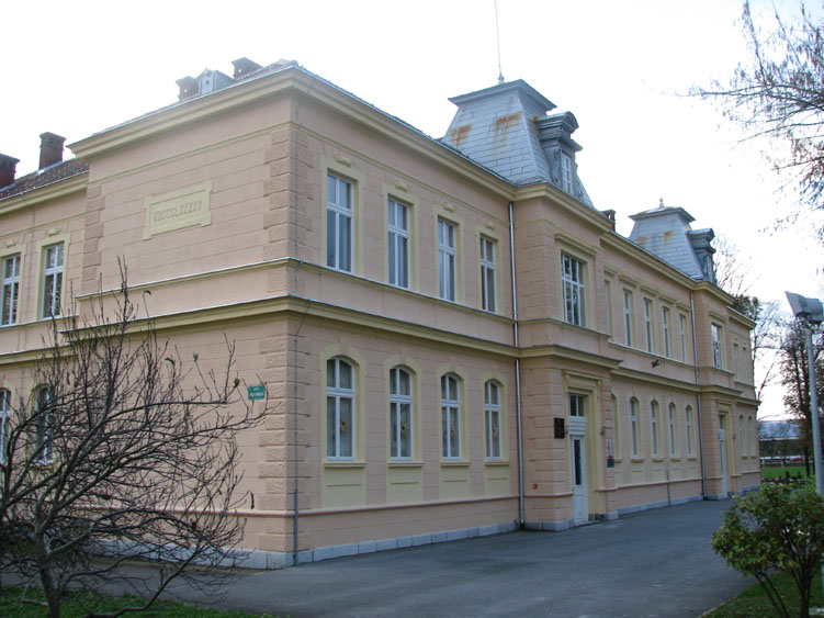 Osnovna škola Dragojle Jarnević, Karlovac